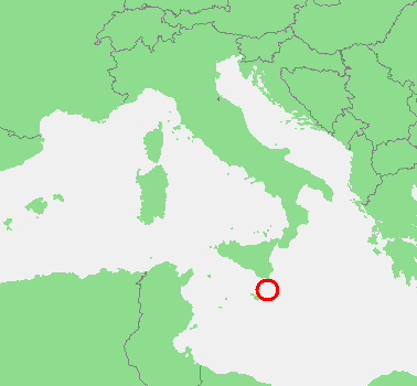 In dutch: Locatie Straat van Malta.PNG